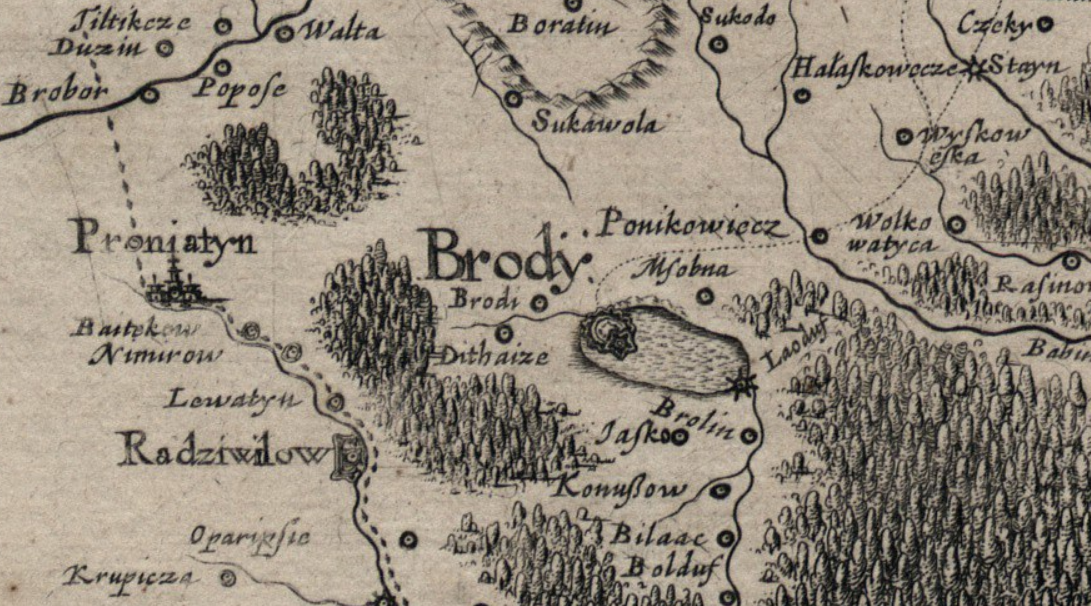 Фрагмент карти України Гійома де Боплана 1648 року